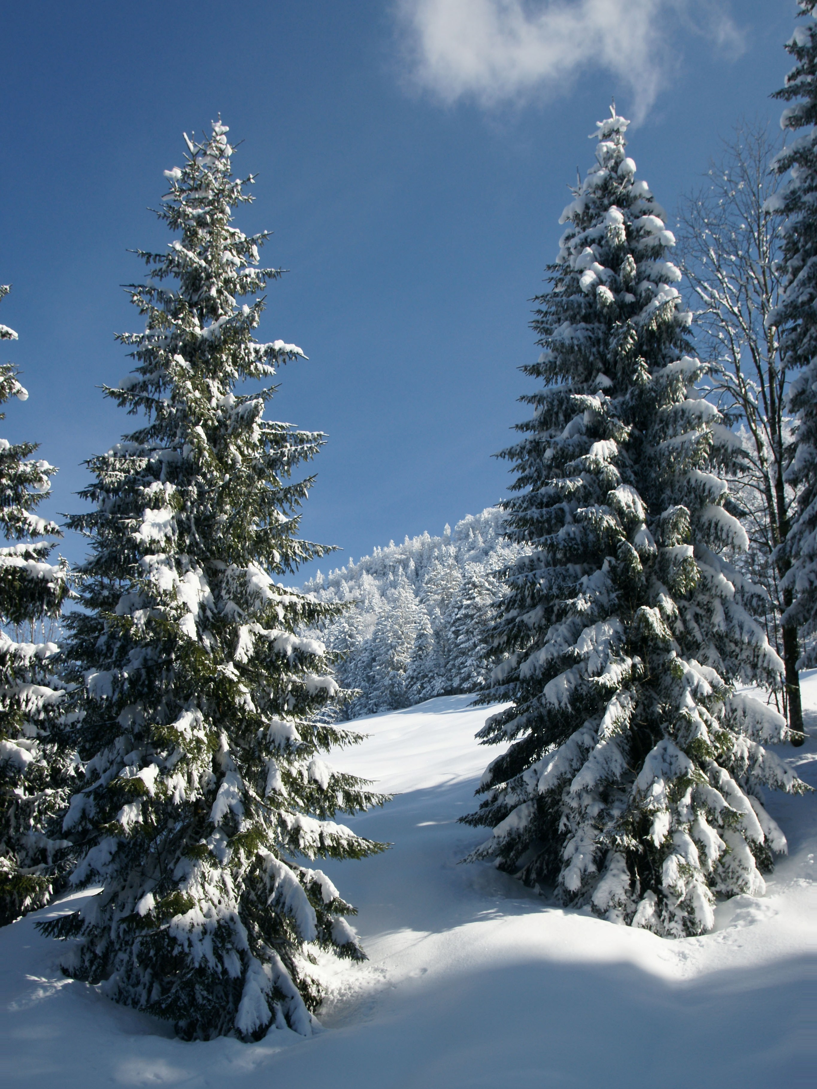 Die Gemeine Fichte (Picea abies) ist eine Pflanzenart in der Gattung der Fichten (Picea). Sie ist in Europa heimisch und der einzige in Mitteleuropa natürlich vorkommende Vertreter der Gattung. Fichtenwald am Brüggelekopf in Alberschwende.